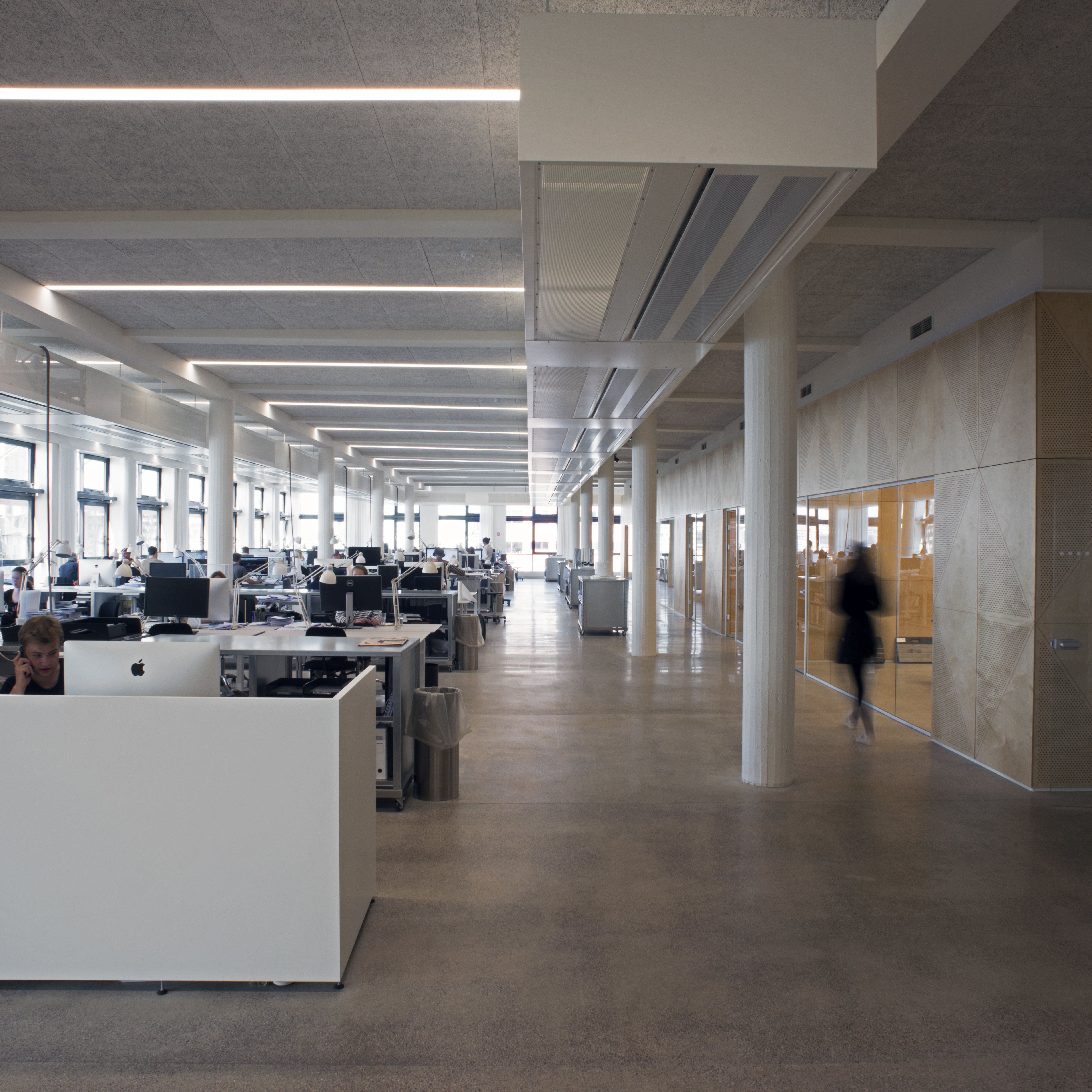 Vilhelm Lauritzen Arkitekters tegnestue på Sundkaj i Nordhavn